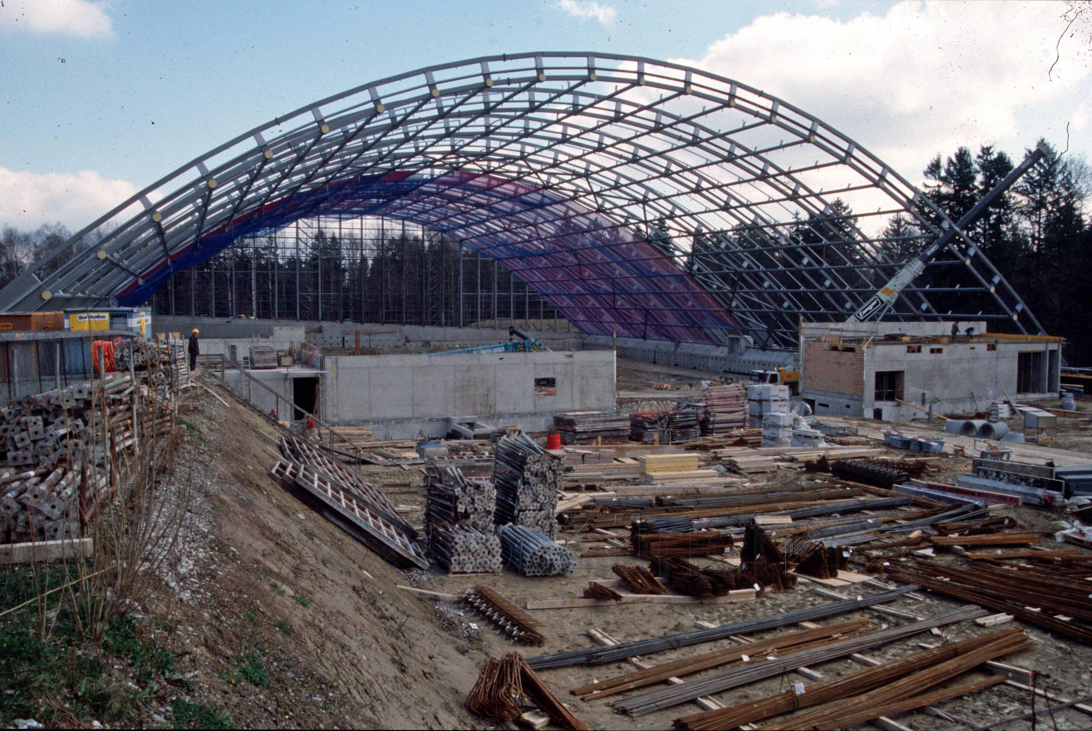 Bau der Masoala-Halle.